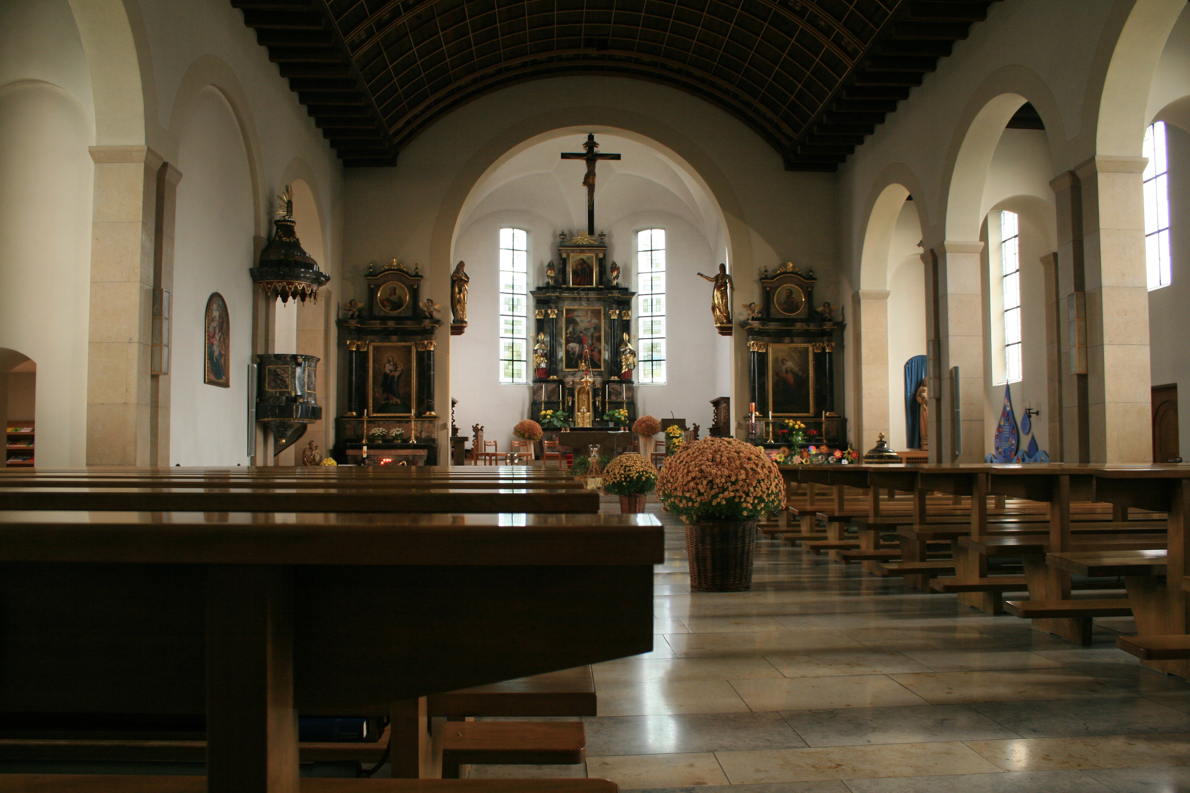 Pfarrkirche St. Martin, Oberrohrdorf